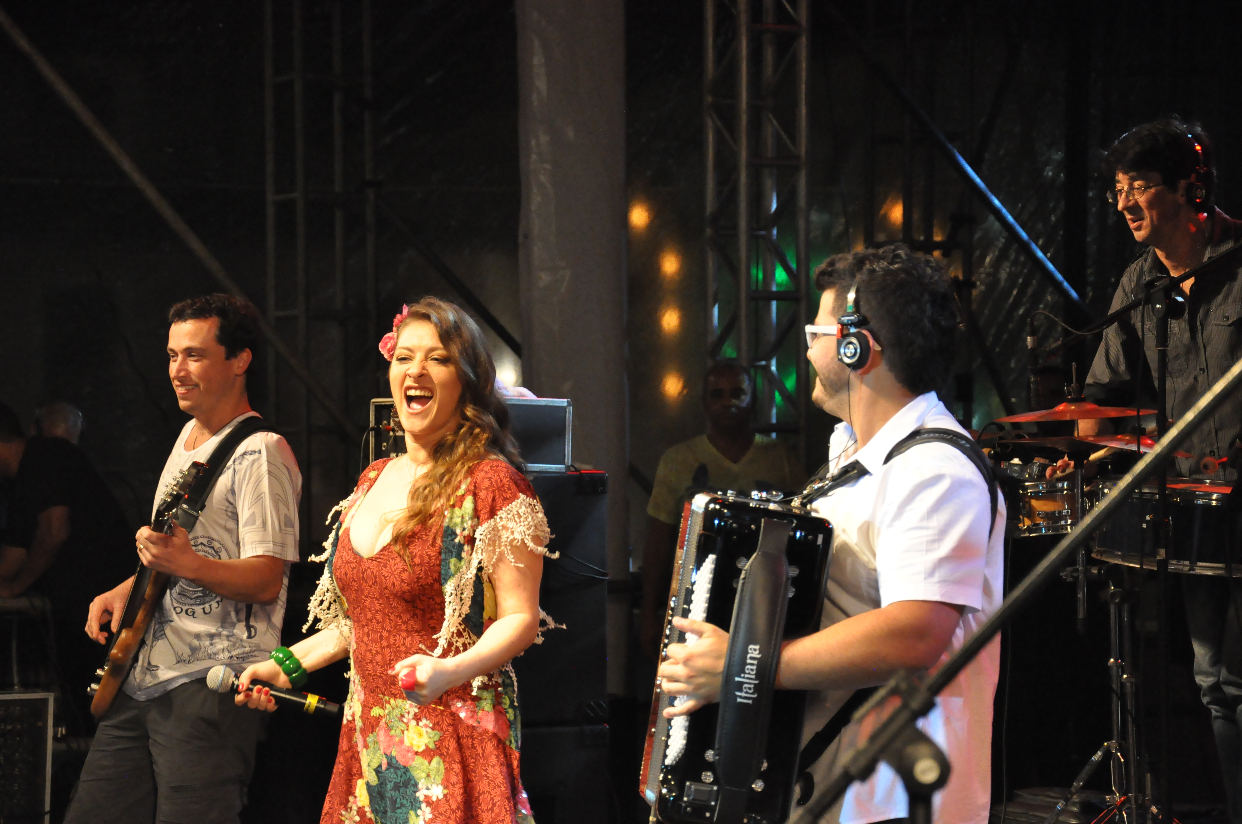 Bicho de Pé é um grupo que compõe e toca música regional brasileira, com ênfase nos ritmos dançantes do norte e nordeste, como xote, baião, samba, forró, xaxado, maracatu, carimbó e arrastapé